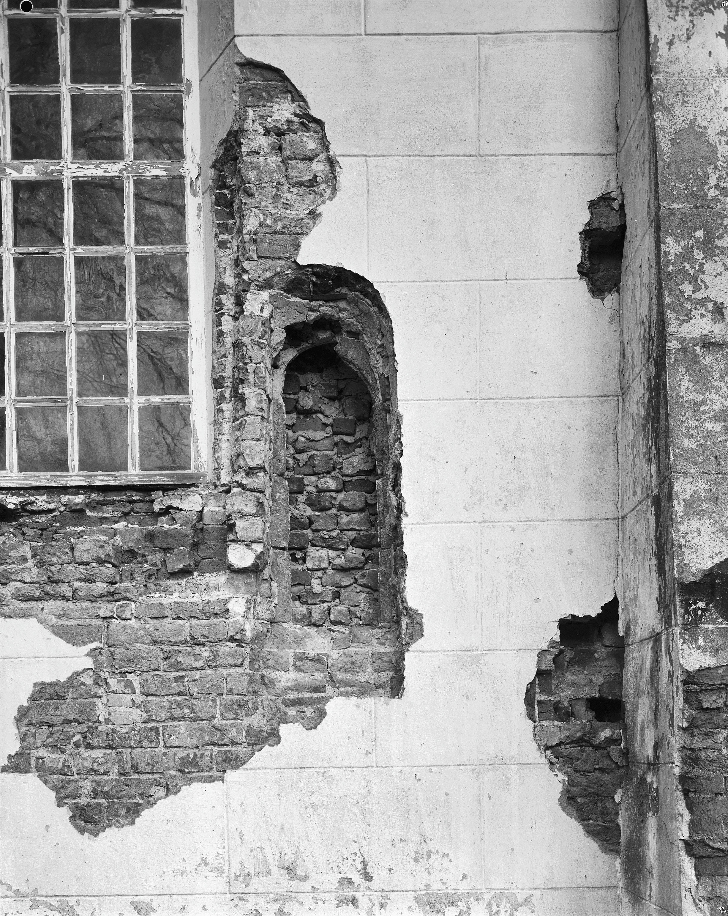 Nederlands Hervormde Kerk: romaans venster zuidzijde schip